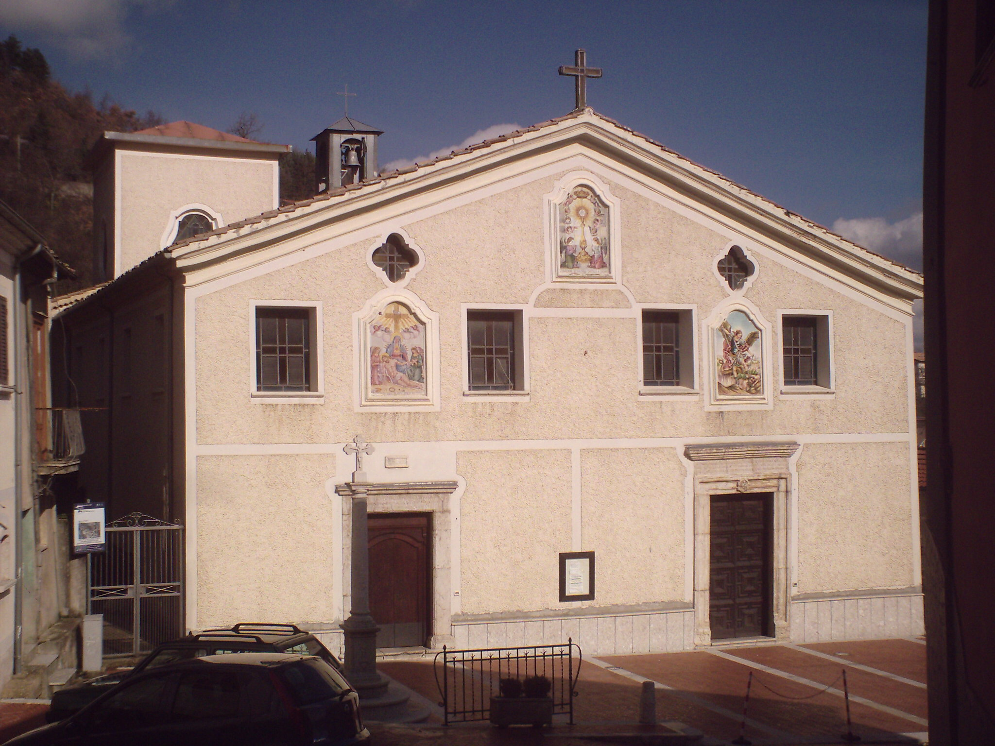 Montella, provincia di Avellino, Italia; chiesa di San Michele nel rione Sorbo.